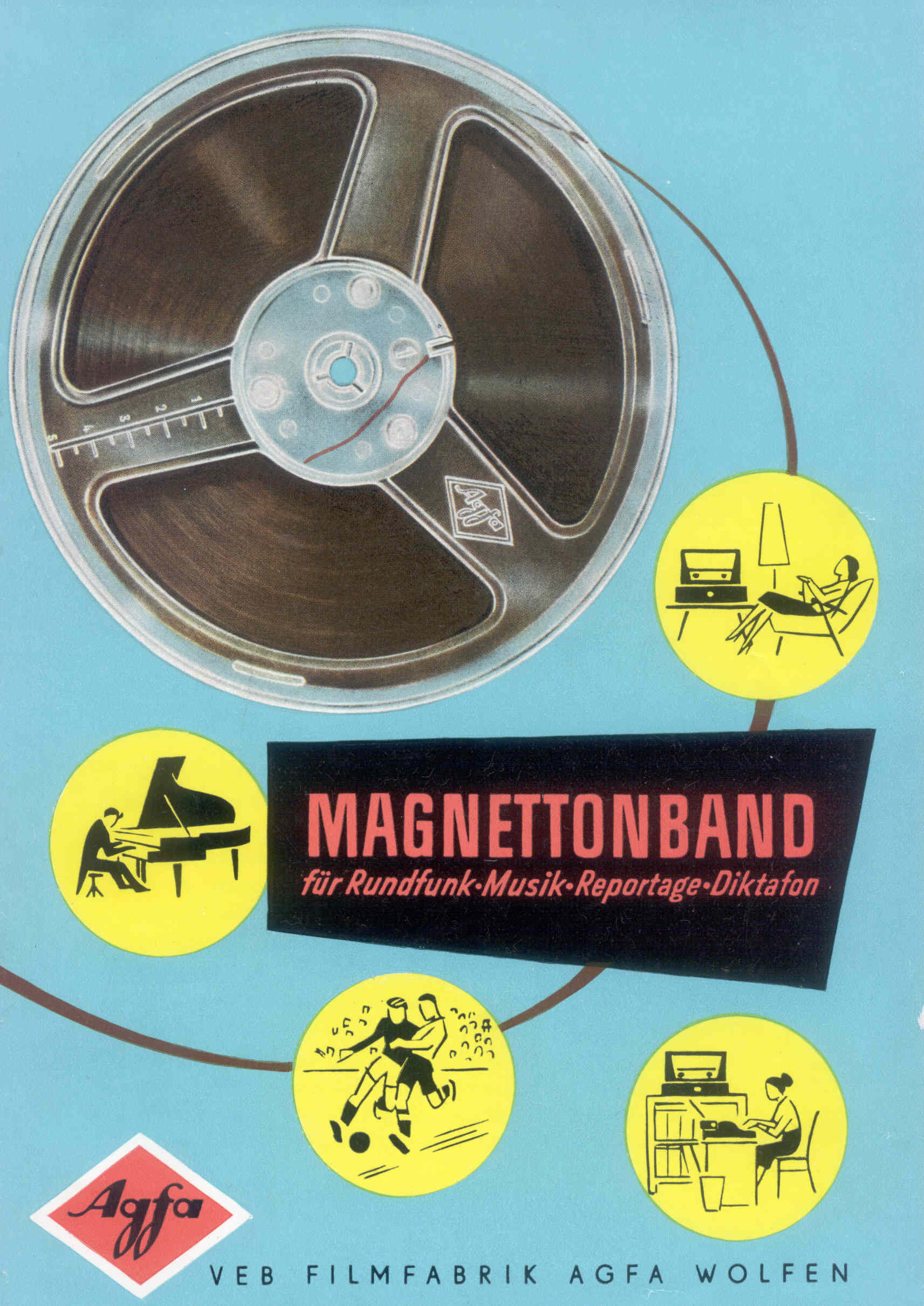 In der Filmfabrik Wolfen wurden seit 1943 Magnetbänder für die Tonaufzeichnung hergestellt.